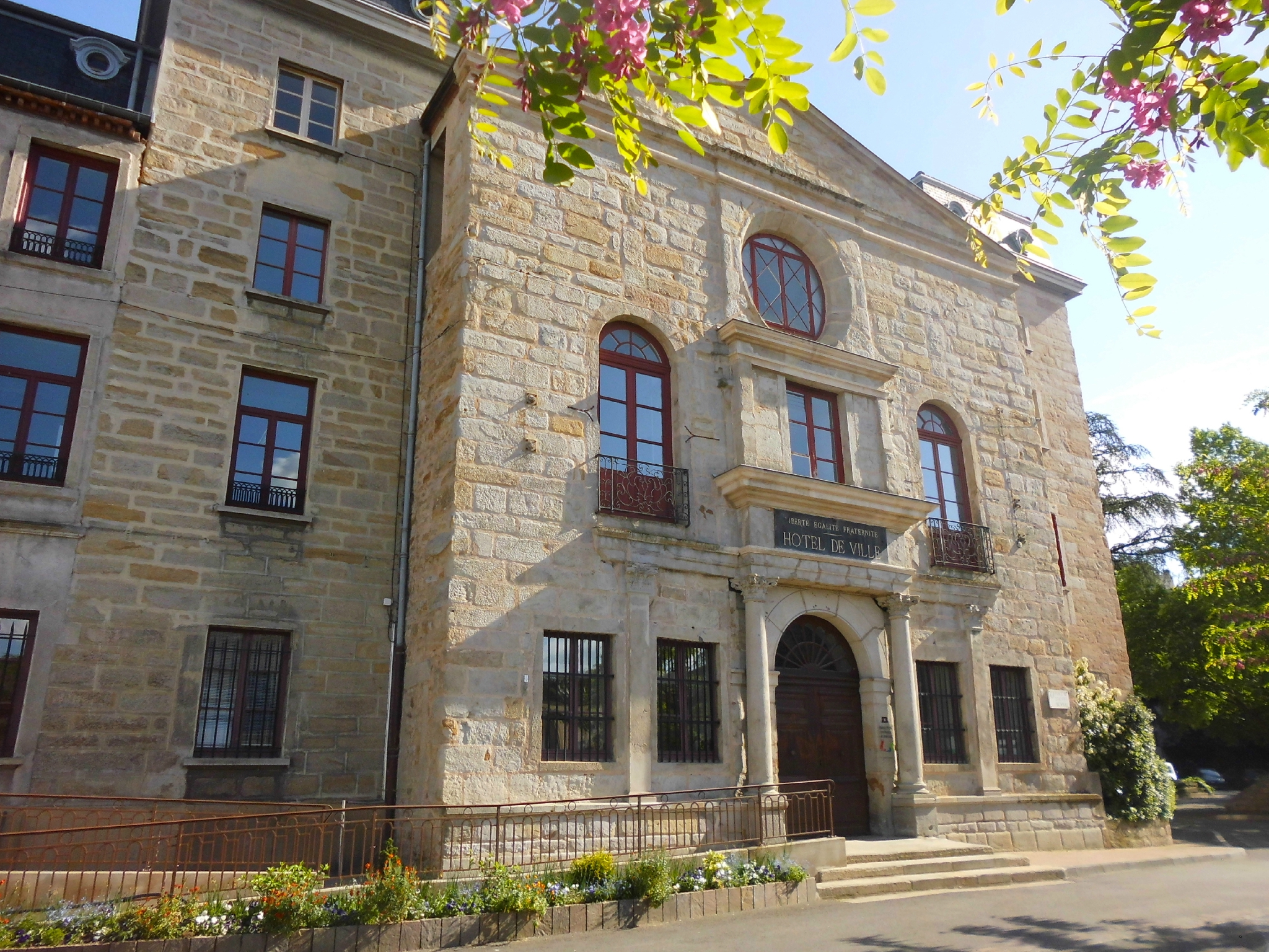 Saint-Chamond (Loire), façade historique de la mairie, 2015.